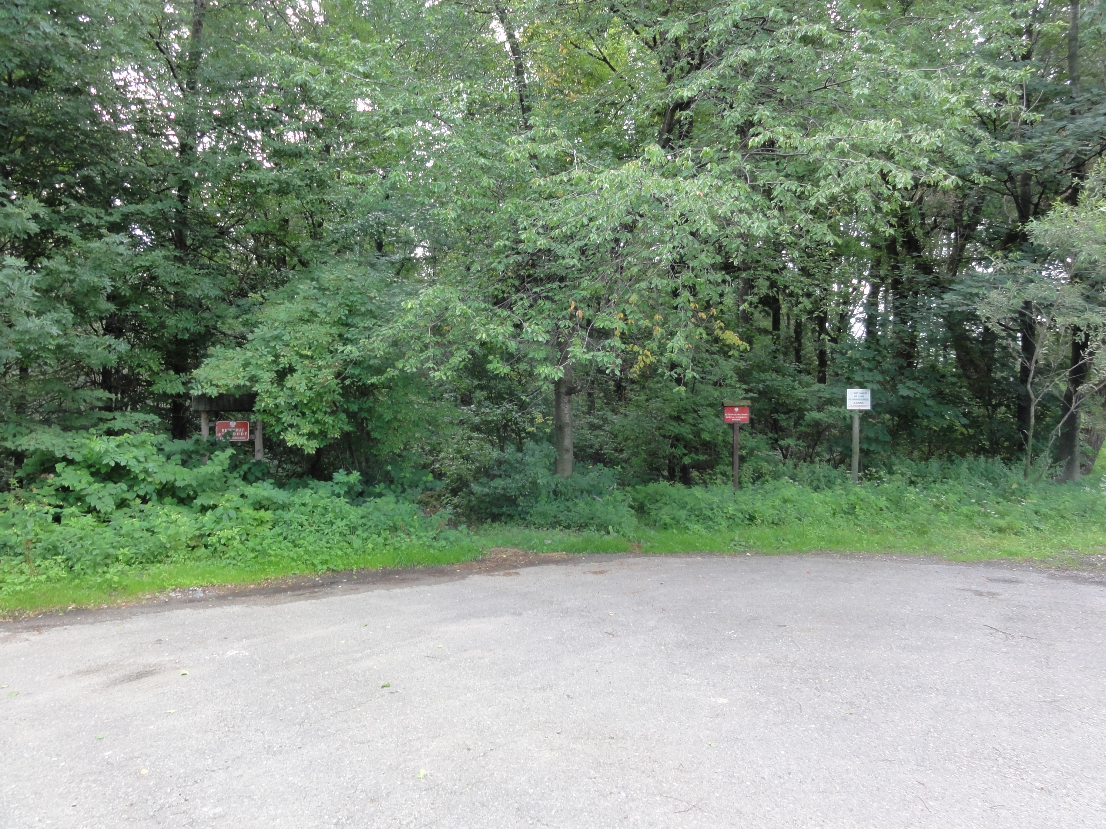 Rezerwat przyrody Dolina Łańskiego Potoku w Grodźcu